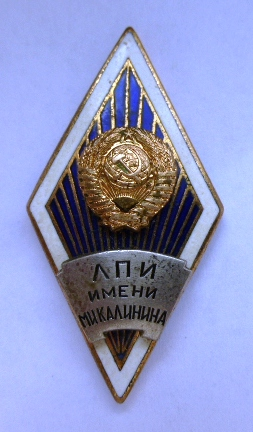 Нагрудный знак выпускника Ленинградского политехнического института имени М.И.Калинина в 1980-е годы